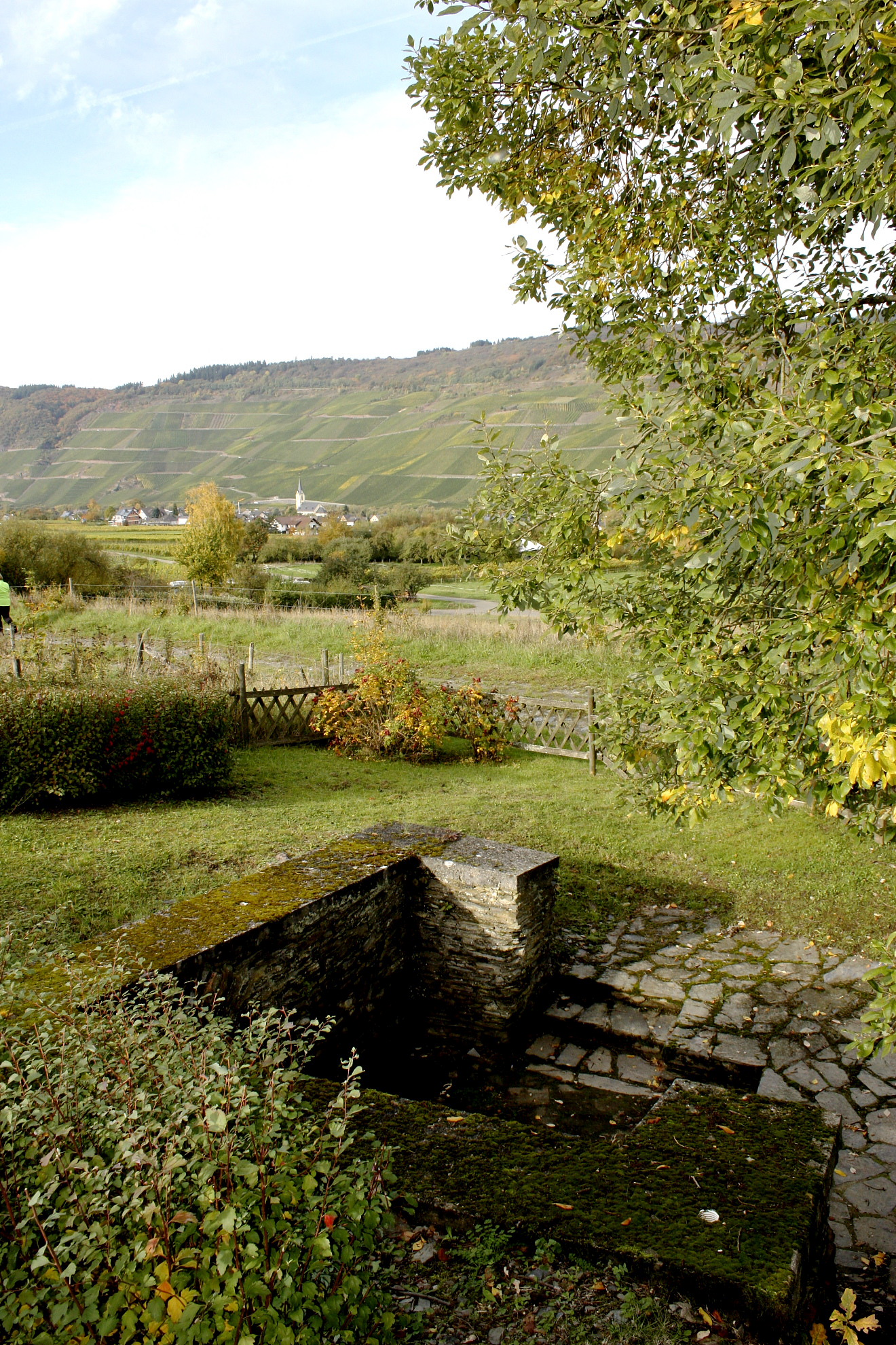 Blick nach Lösnich vom Standort der Kinheimer Römervilla 2013